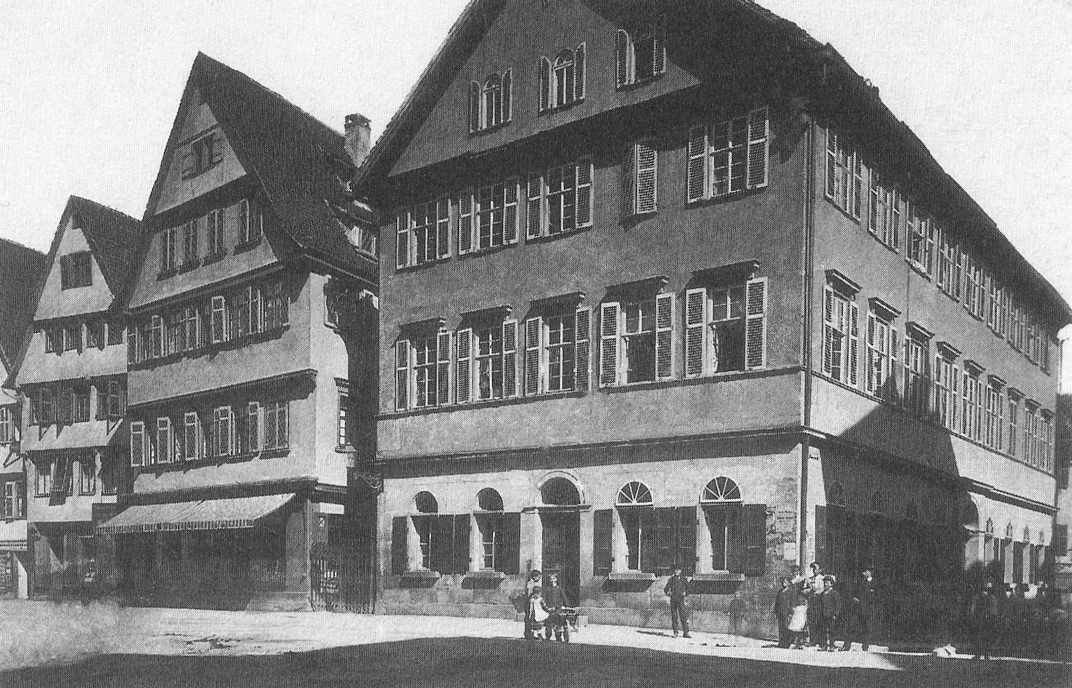 Tübingen. Das Haus an der Ecke Holzmarkt / Neue Straße (jetzige Adresse Neue Straße 1) wurde 1830 für den Gerichtshof des Schwarzwaldkreises nach dem Entwurf von Kreisbaurat Christian Friedrich Roth fertiggestellt. Der Gerichtshof hatte nach seiner Gründung 1818 seinen provisorischen Sitz im ehemaligen Gasthaus ‚Adler‘, das sich früher an der gleichen Stelle befand, allerdings weiter in den Holznarkt hinausragte und deswegen als Hindernis galt. Das Gebäude beherbergte auch zwei Wohnungen: des Gerichtshofdirektors und des Gerichtsdieners. Paul Sinner, dessen Vater Gerichtsdiener und Hausverwalter war, wohnte hier als Jugendlicher in den Jahren 1840–1854. Seit 1875 befand sich in dem Gebäude das Offizierskassino.